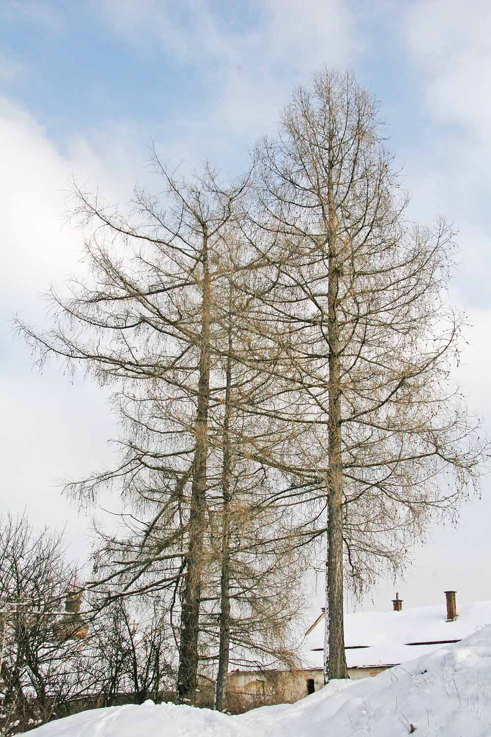 Larix decidua autor:Prazak